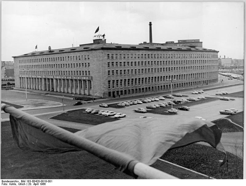 Berlin, Werderscher Markt, Gebäude des Zentralkommites der SED Zentralbild Kohls bgm-at 20.4.1966 Berlin: Das Gebäude des Zentralkomitees der Sozialistischen Einheitspartei Deutschlands am Werderschen Markt